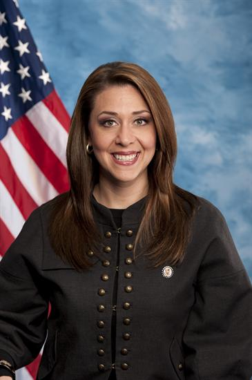 Jaime Herrera Beutler, Congresswoman